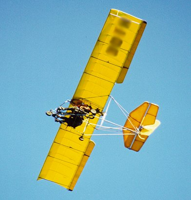 ULM multi-axes Contents 1 Détails 2 Source 3 Statut 4 Licensing 5 Original upload log Détails QuickSilver jaune, 3 axes Source Collection privée Statut 2000 Jean-Samuel Wienin